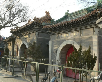 广济寺山门。